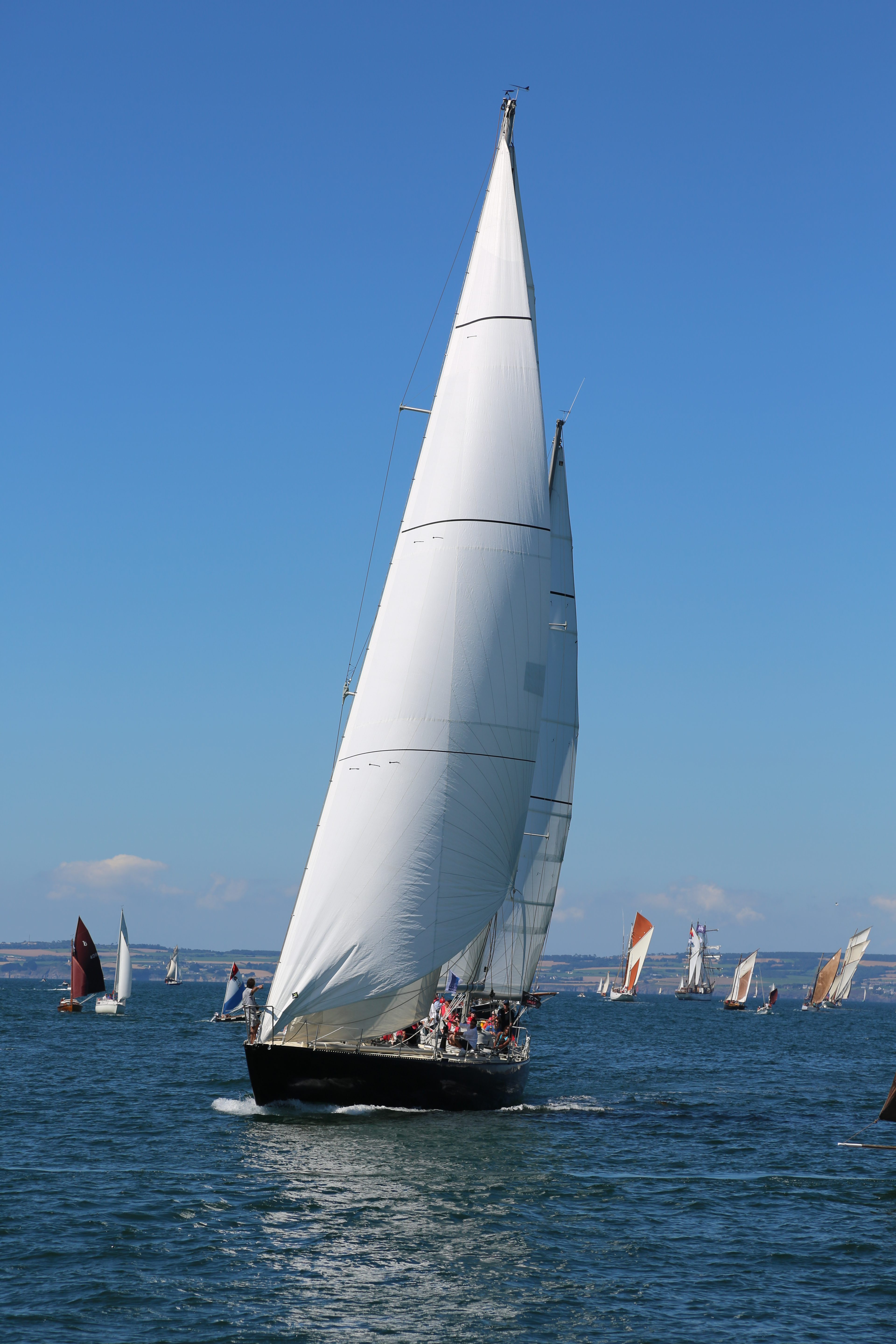 Temps de fêtes Douranenez 2012